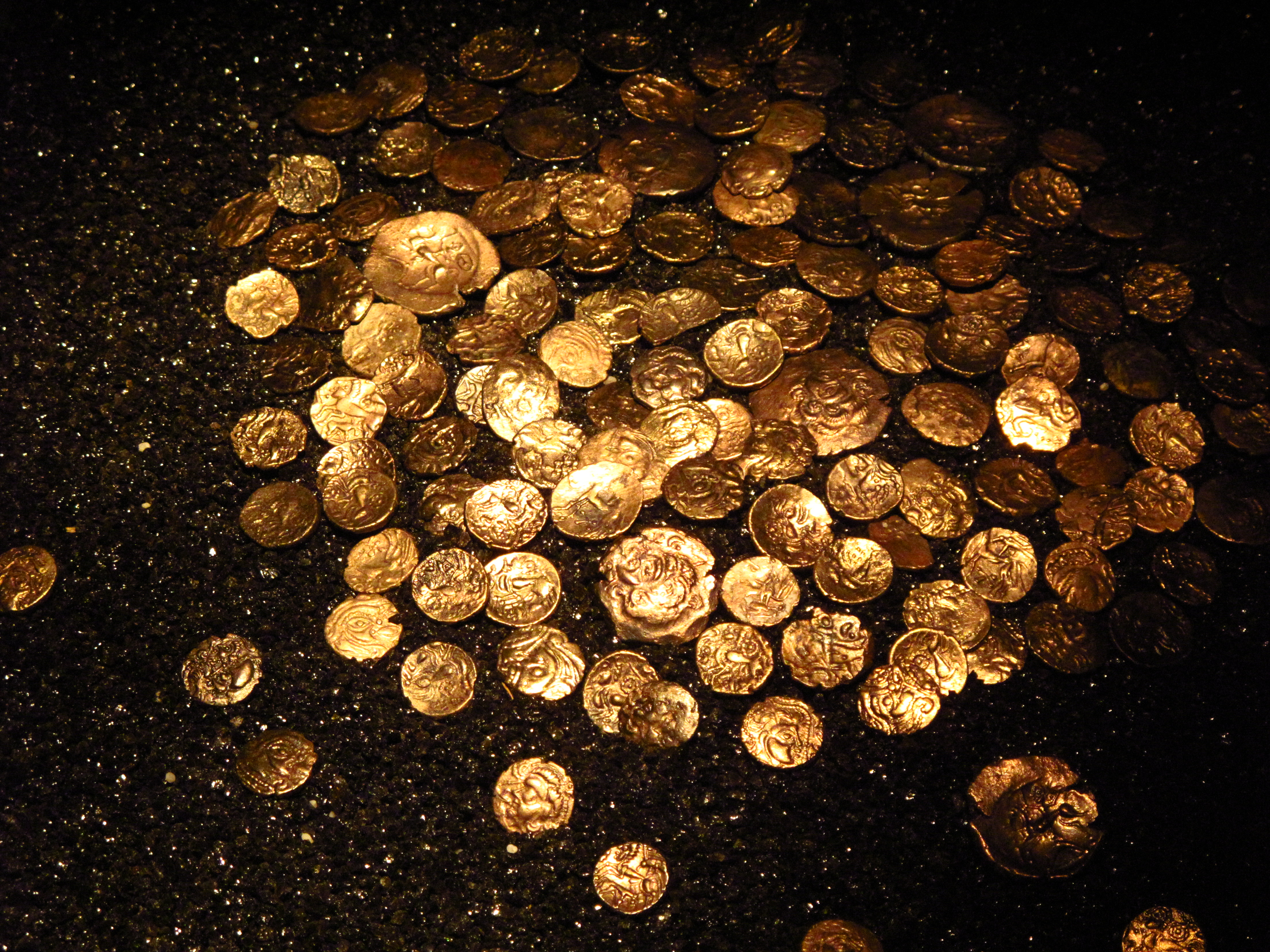 Monnaies d'électrum de la cité es Osismes, servant à payer les transactions importantes, vers -50 avant J.C. (Bretagne est Univers, Musée de Bretagne, Rennes, France)